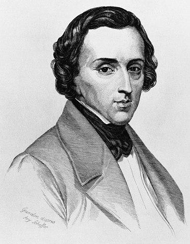 Portrait of Frédéric Chopin